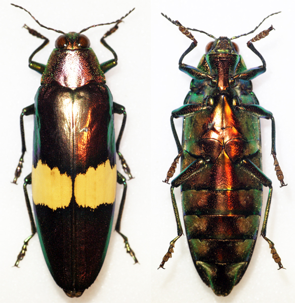 Buprestidae - In collection